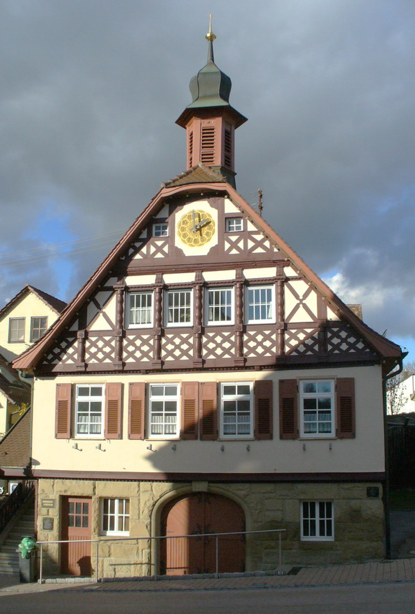 Remseck-Neckarrems